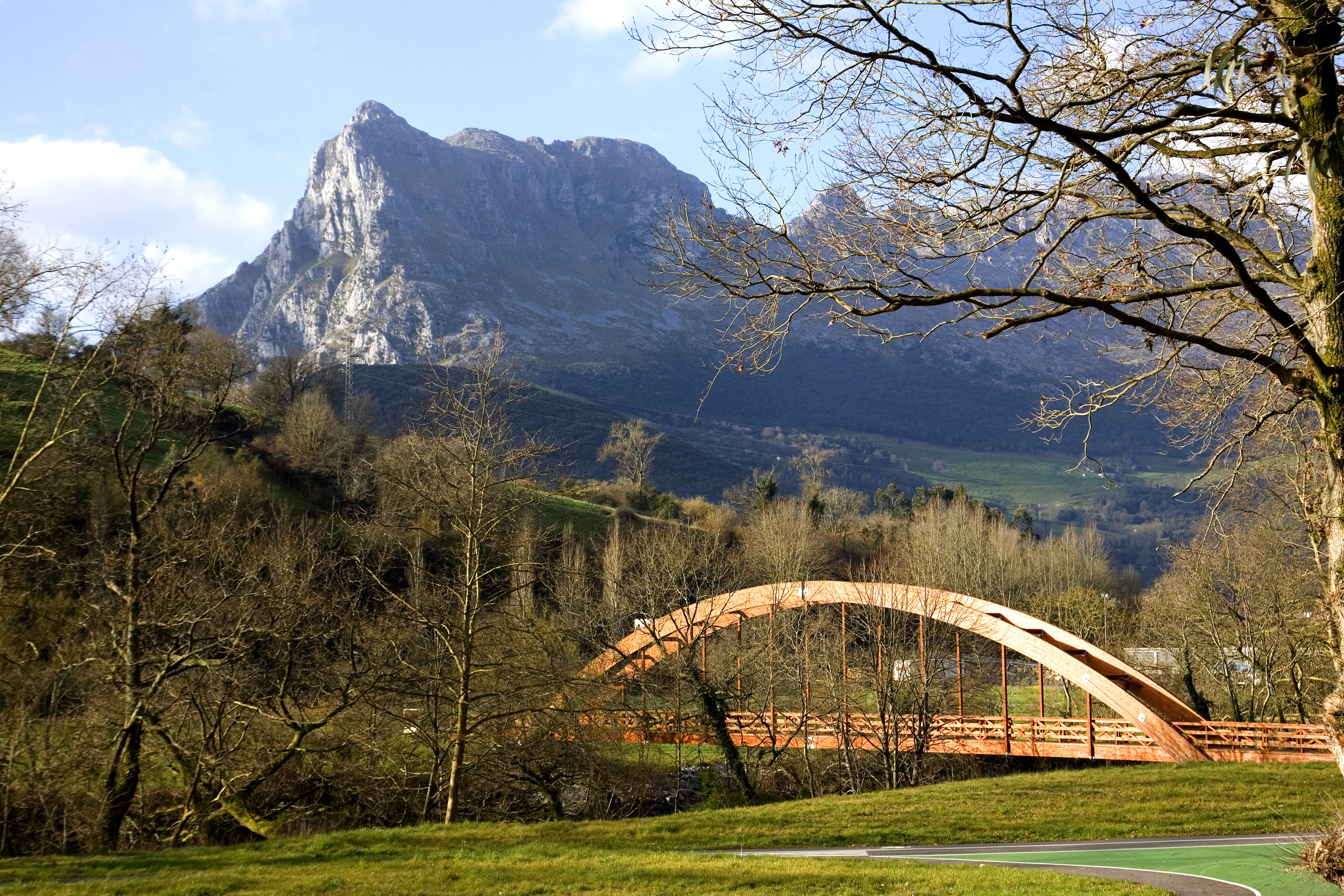 Vistas del Pico de San Vicente y puente de madera sobre el río Asón desde el parque de Cubillas de